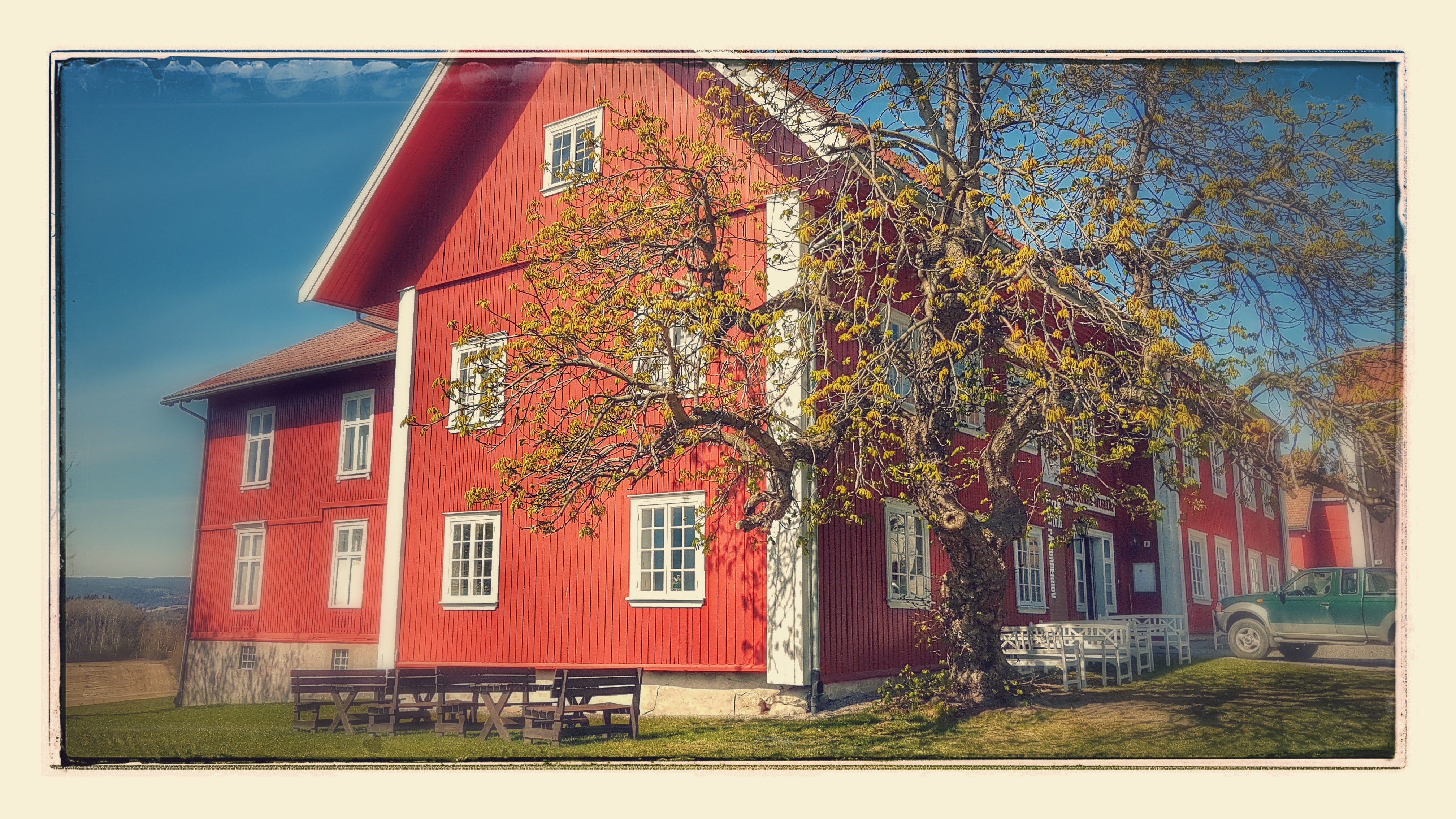 Norderhov gamle prestegård (stilisert)